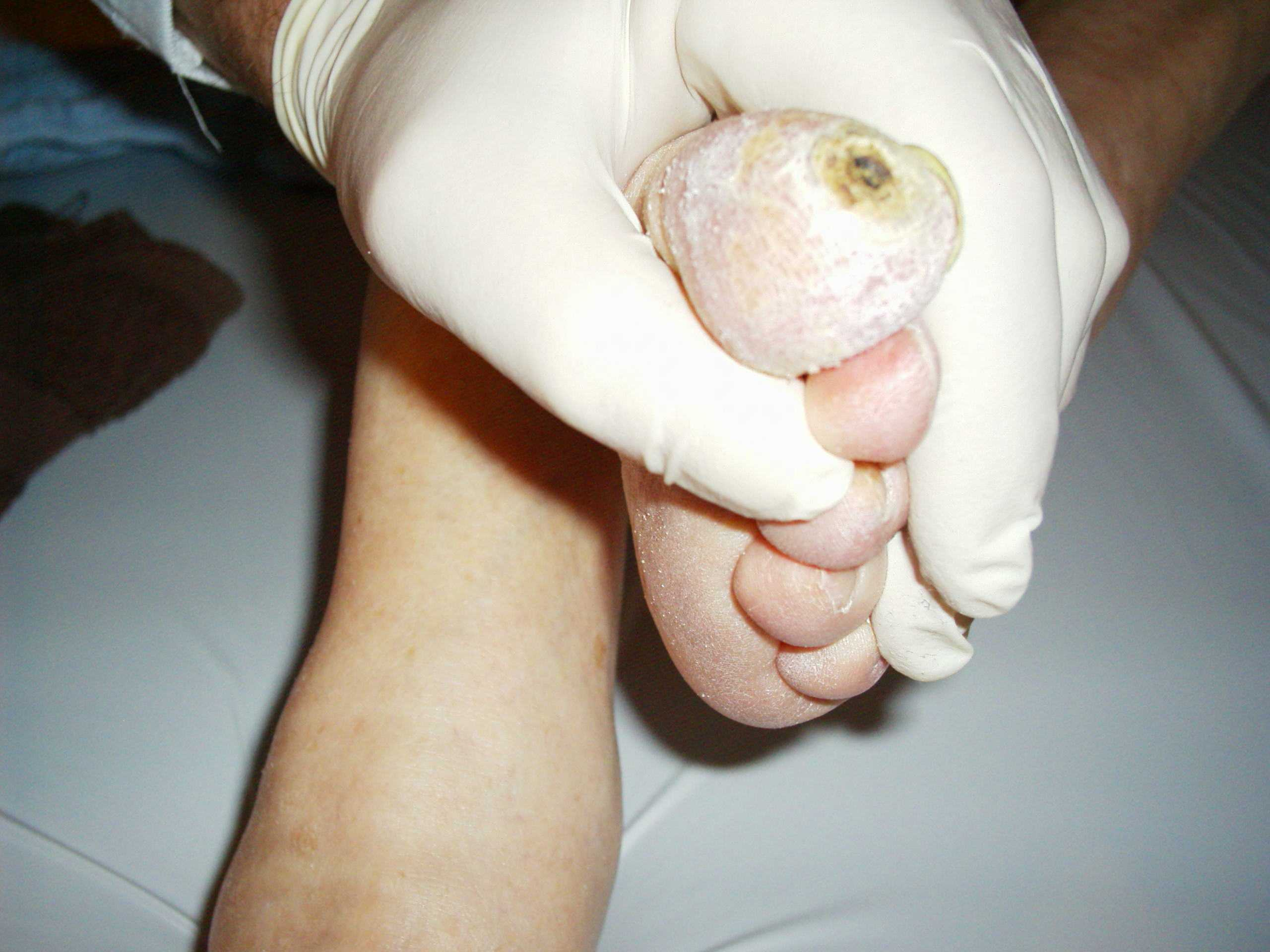 Geschwür am diabetischen Fuß